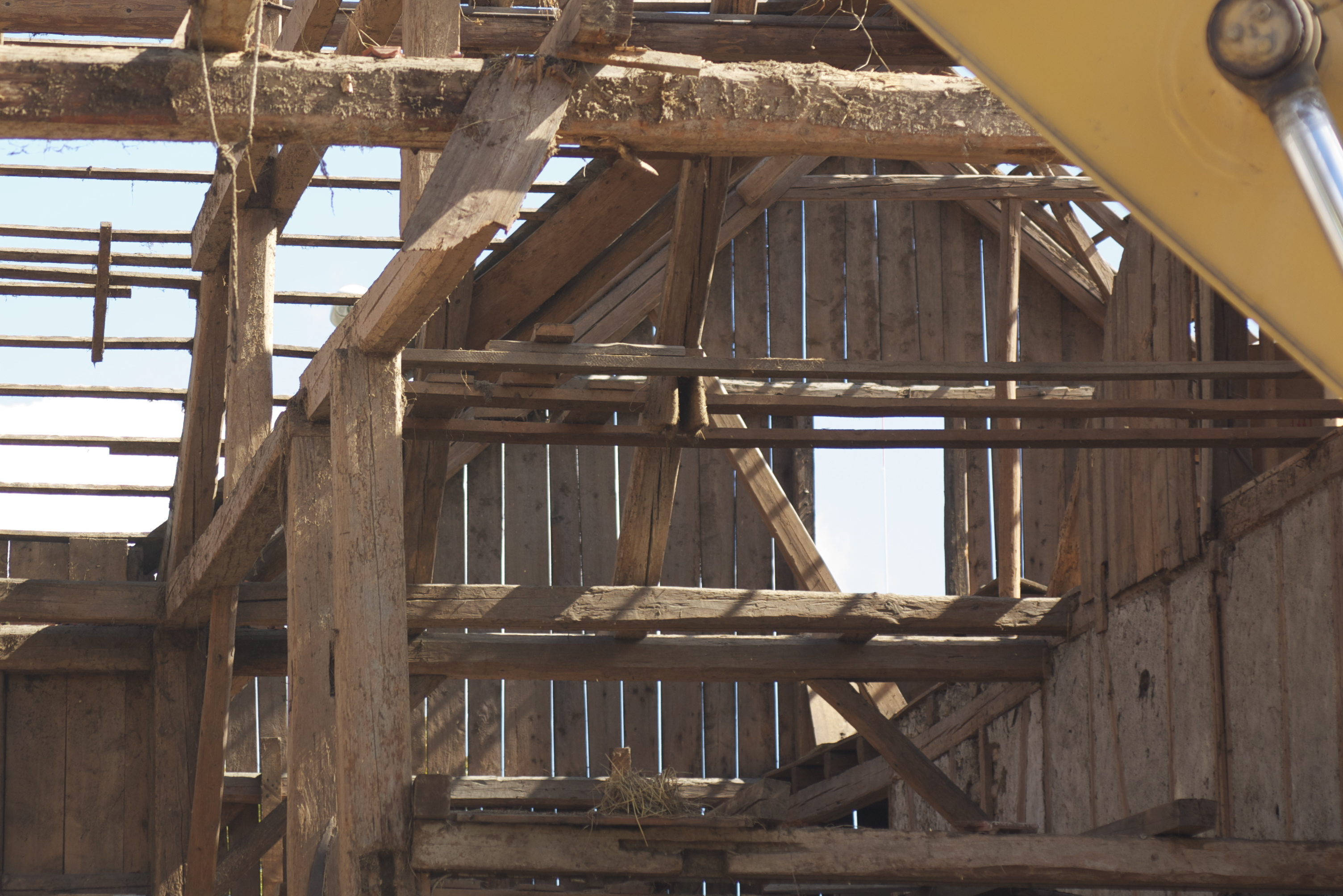 Blick in das Gebälk des Wirtschaftsteils beim Abbruch des Bauernhauses am Standort der ehemaligen Kyburger Zehntscheune.